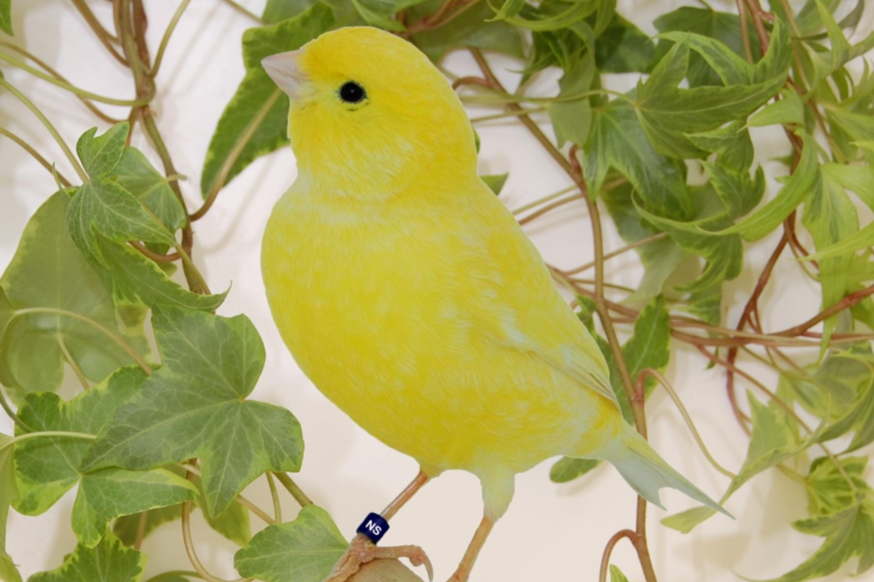 Farbenkanarie Aufgehellt Gelb schimmel